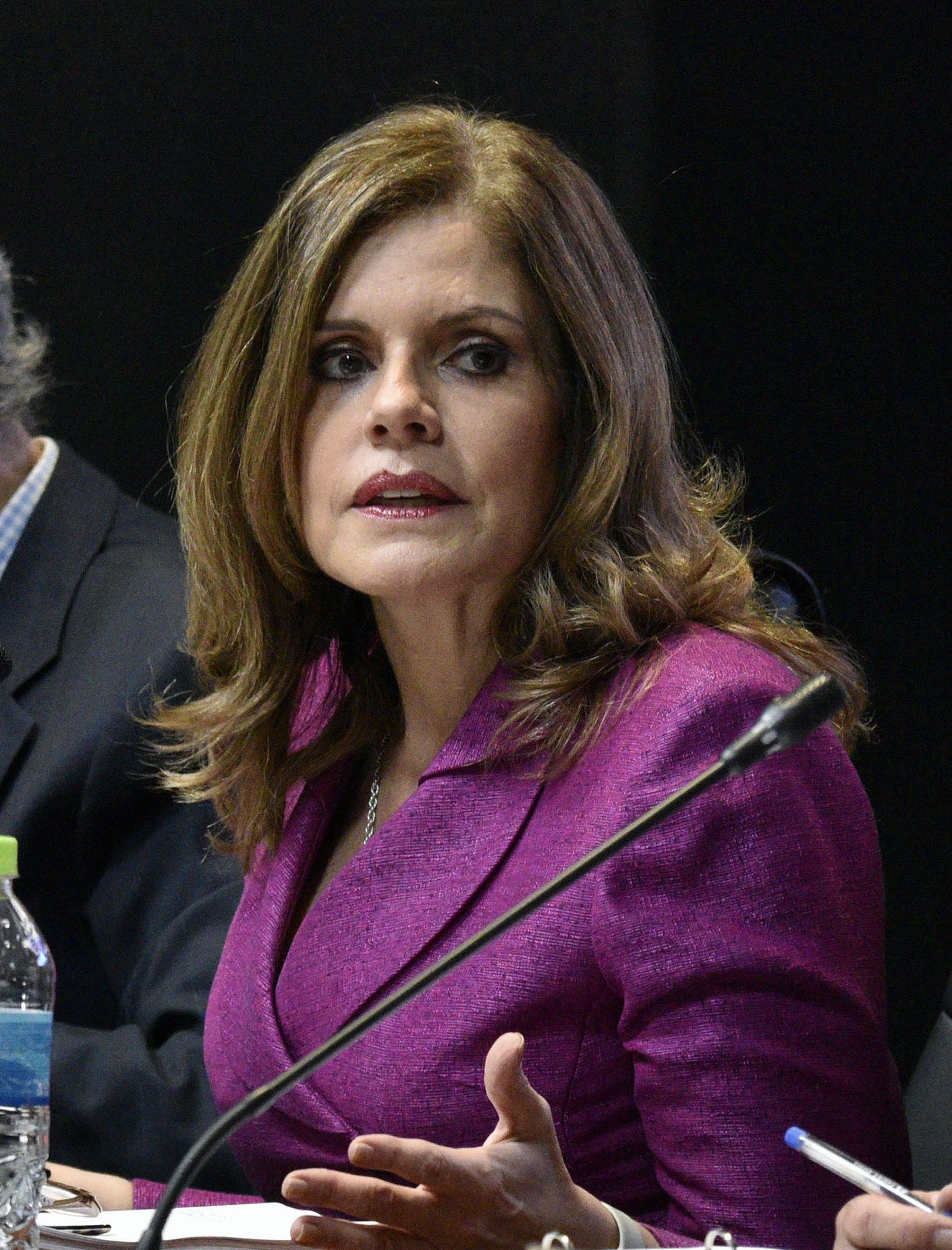 Mercedes Aráoz, segunda vicepresidenta del Perú, desde el 28 de julio de 2016.